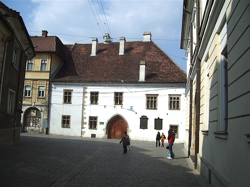 Cluj-Napoca, Casa lui Matei Corvin, str. Matei Corvin nr.6